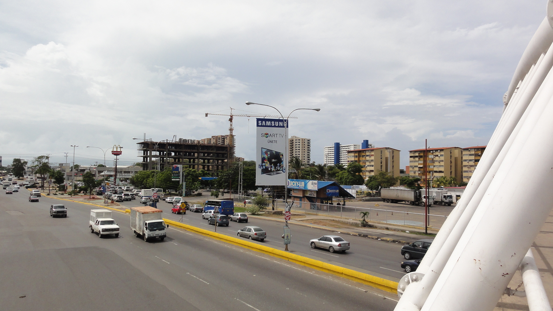 Urbanizacion Las Garzas, Barcelona, Venezuela